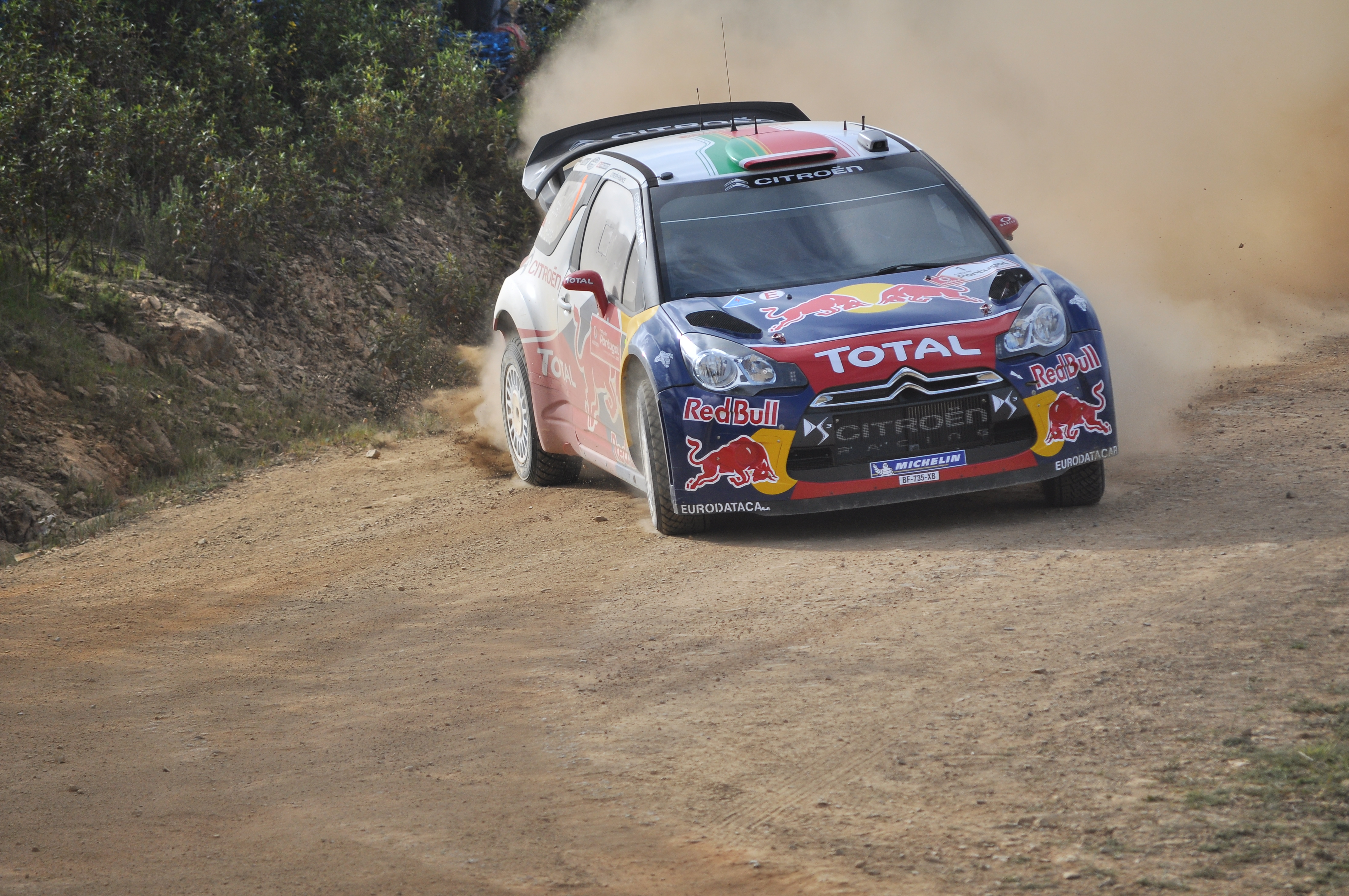 Vodafone Rally de Portugal 2011 - (Santa Clara) - Loeb